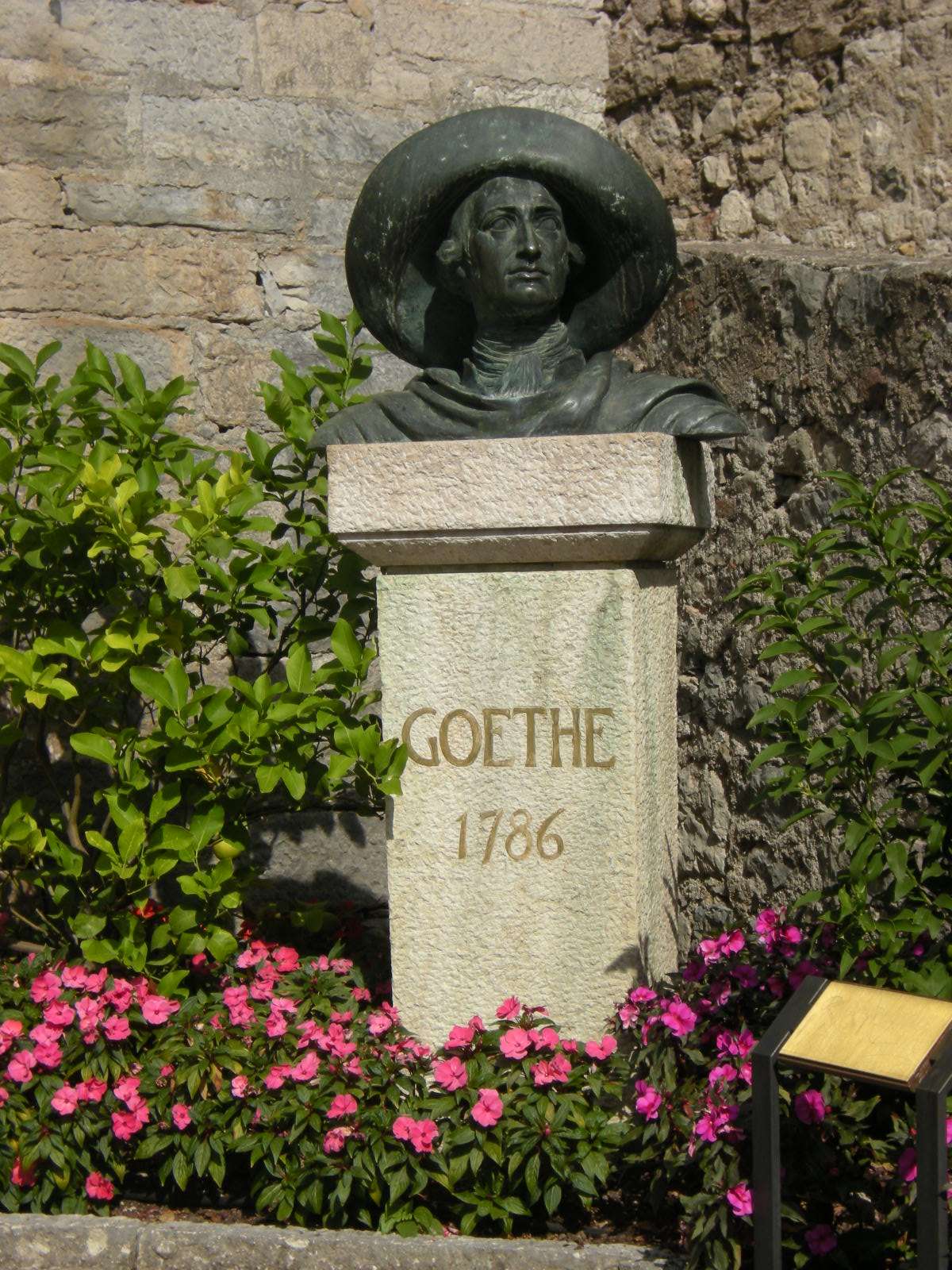 Castello di Malcesine: busto di Goethe